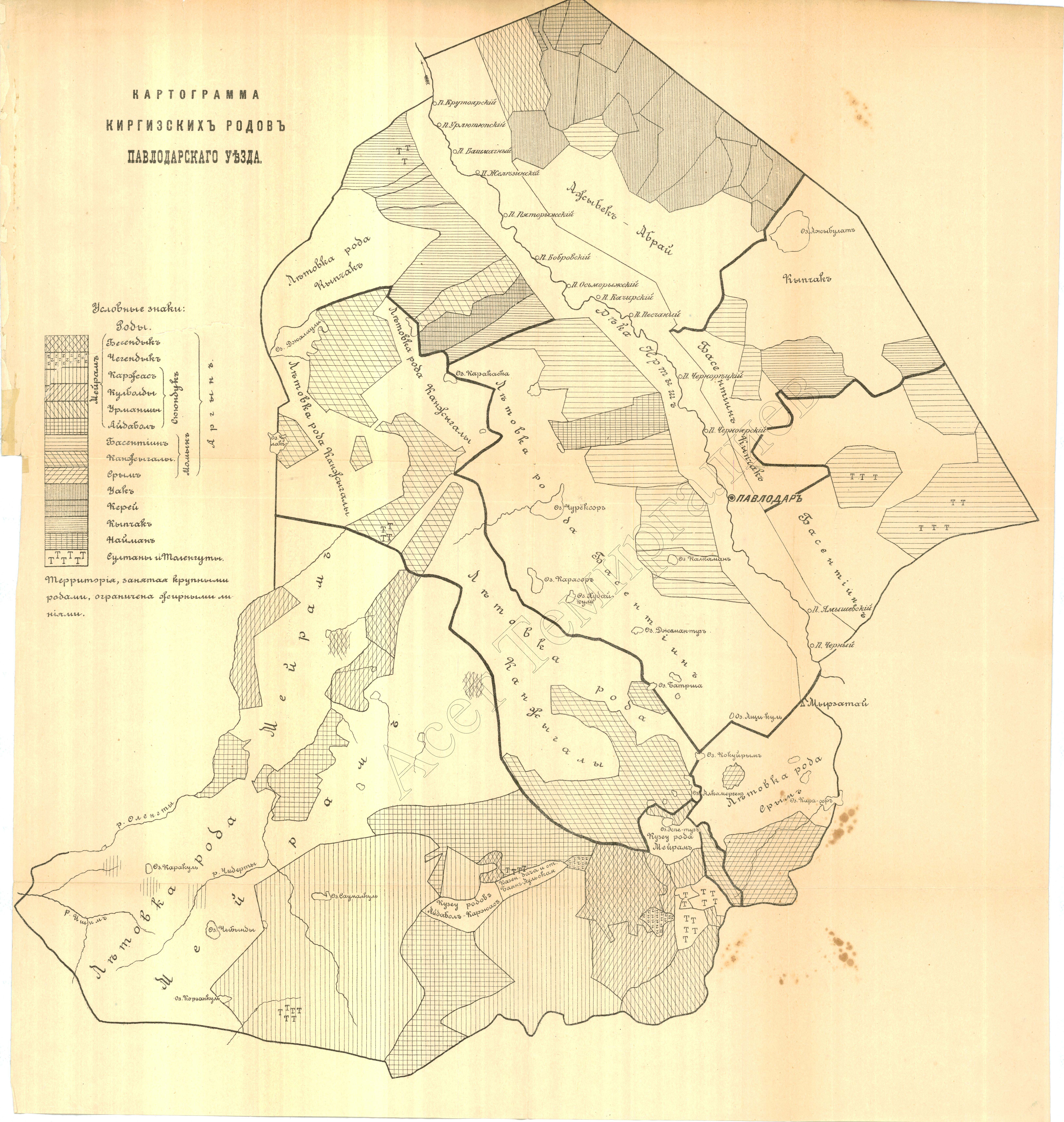 Павлодар уезі